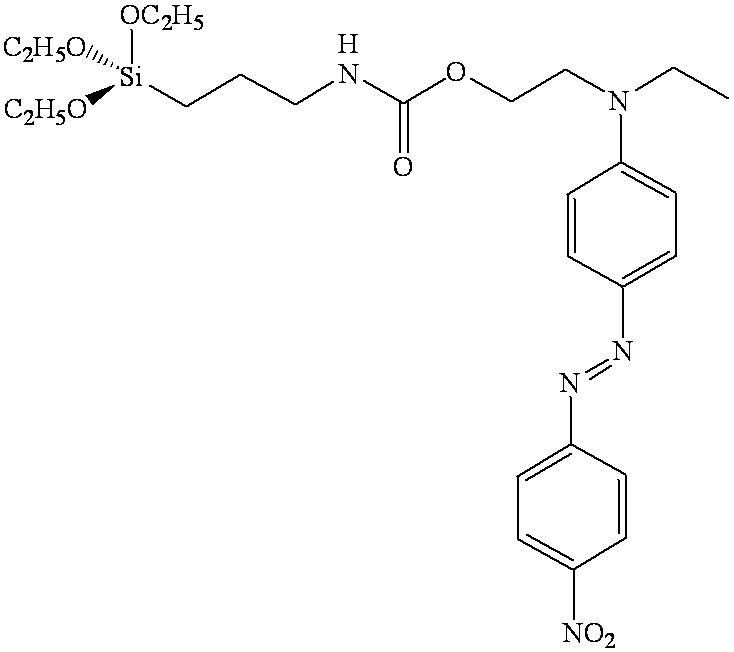 Alkoxysilane fonctionnalisé avec une molécule de type azobenzène Auteur : Frédéric Chaput, réalisé avec un programme de dessin. Licence GFDL Frédéric Chaput